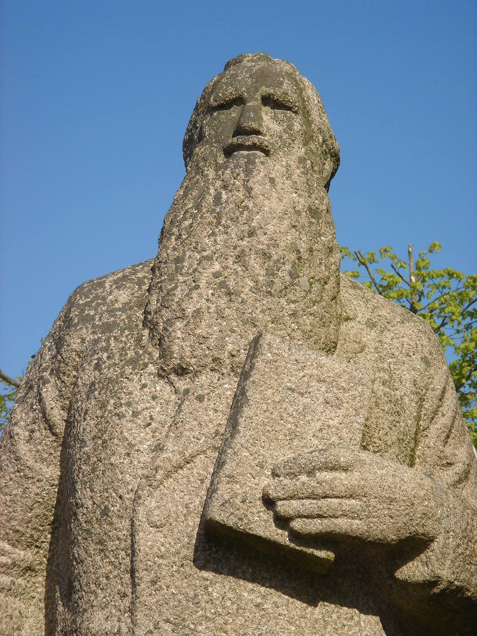 Detalj fra statue av Lars Dahle. Statuen står ved Misjonshøgskolen i Stavanger. Detail from statue of Lars Dahle. The statue is found outside Misjonshøgskolen in Stavanger, Norway.